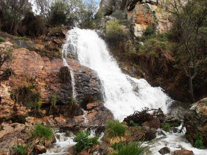 Garaganta del Fraile, SERRADILLA